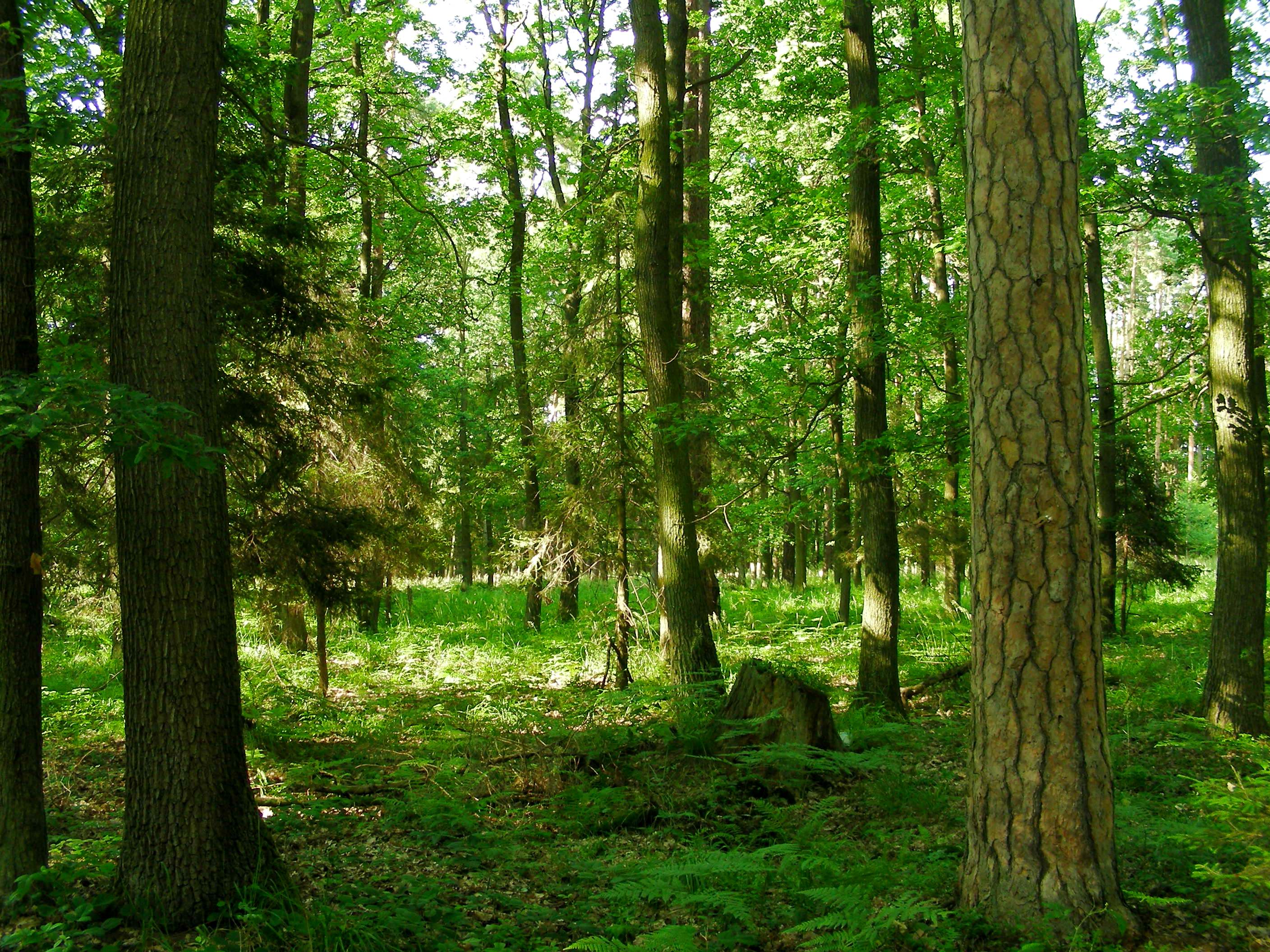 Rezerwat przyrody Jaśkowice, gmina Prószków, województwo Opolskie, Polska